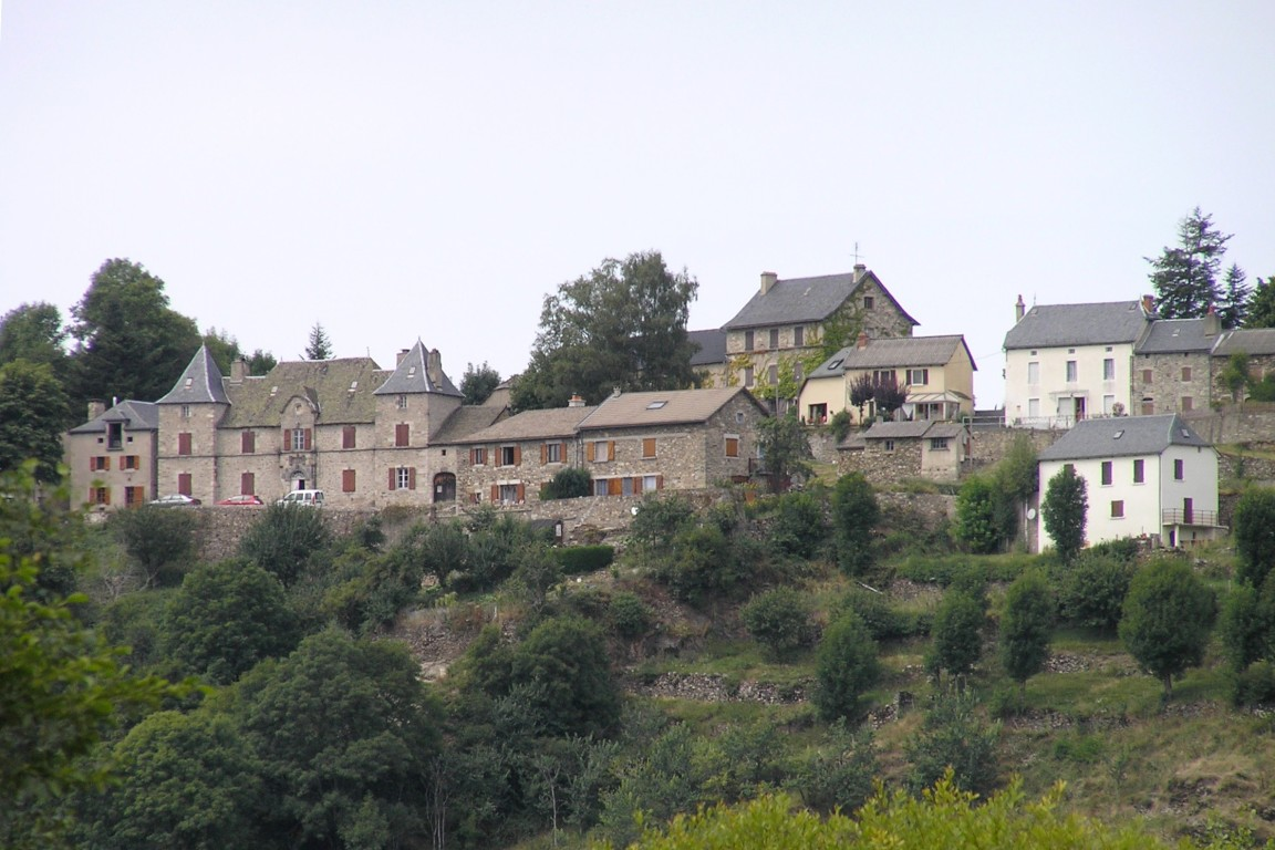 Le village de Chaliers (15) Margeride France